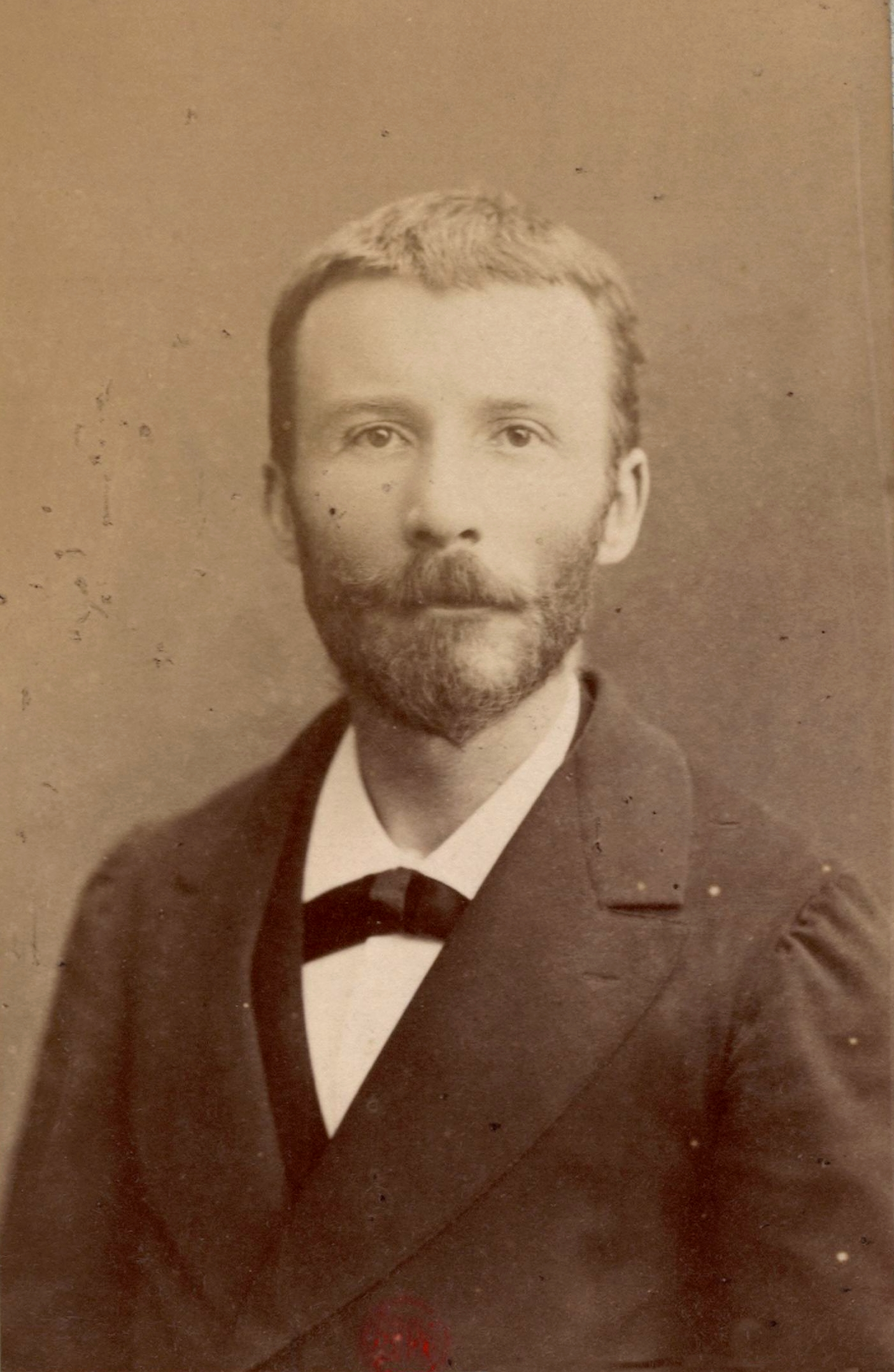 Olivier Pain (1845-188 , photographie de l'atelier Nadar.